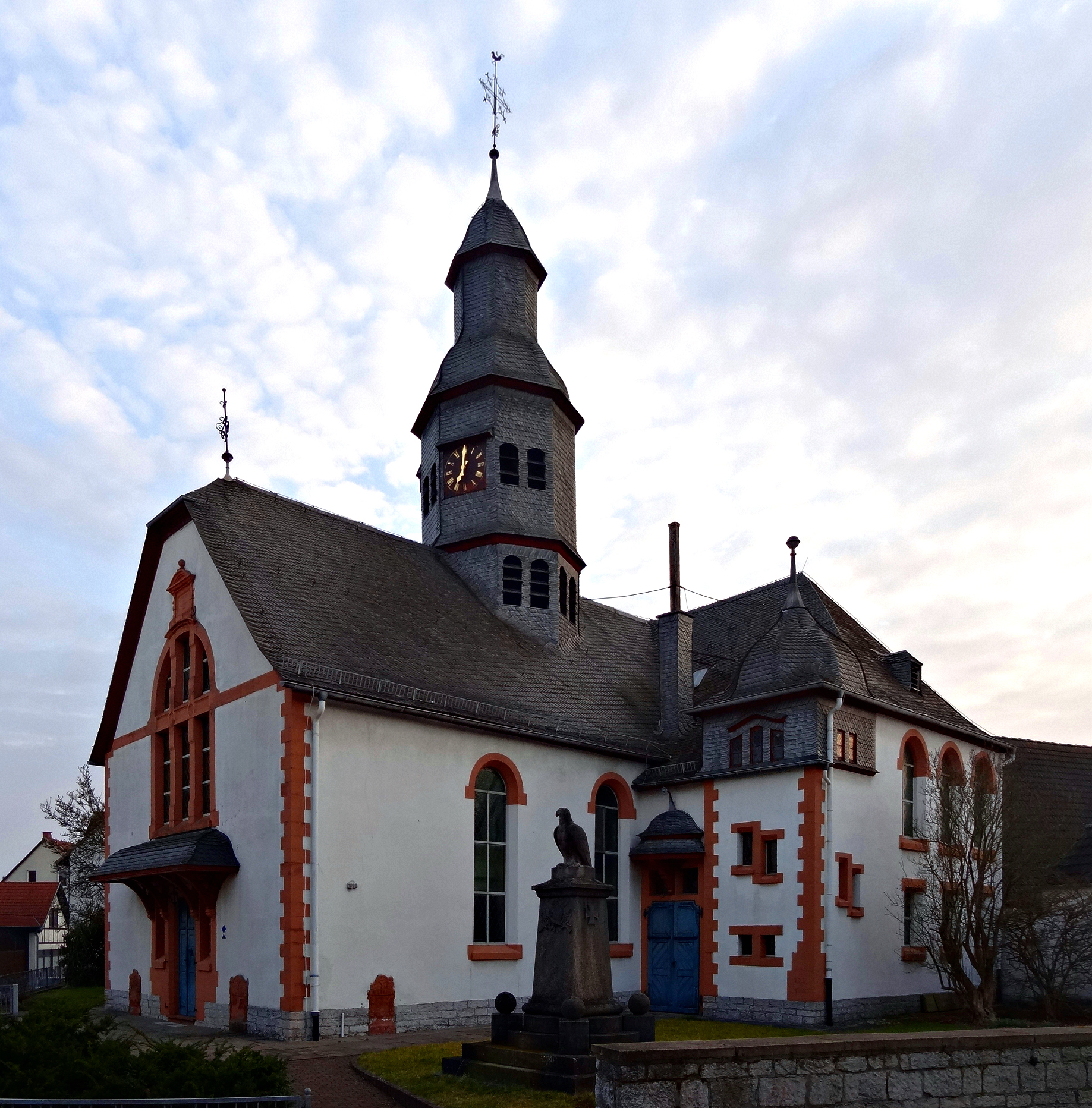 Evangelische Kirche Hochelheim